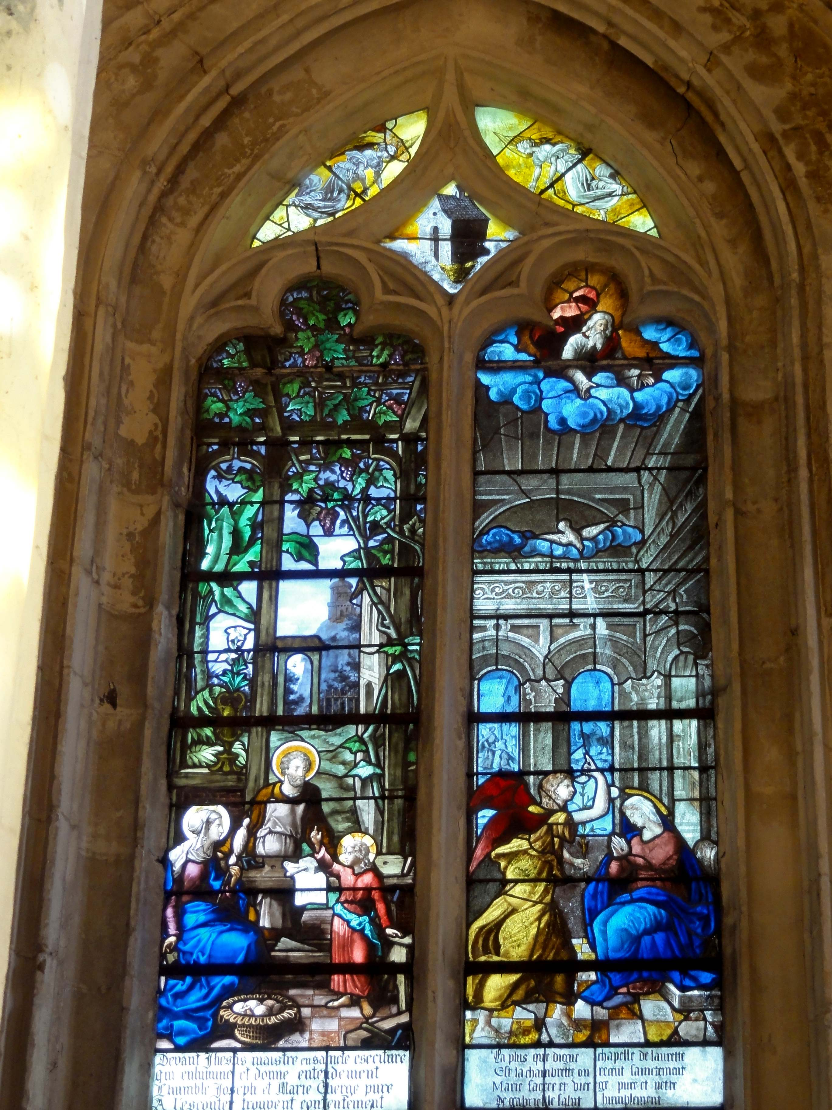 Verrière n° 2 (travée d'axe du déambulatoire, droite) - lancette de gauche : intérieur de Nazareth (XIXe siècle) ; lancette de droite : Annonciation. Seulement la lancette de droite est classée.